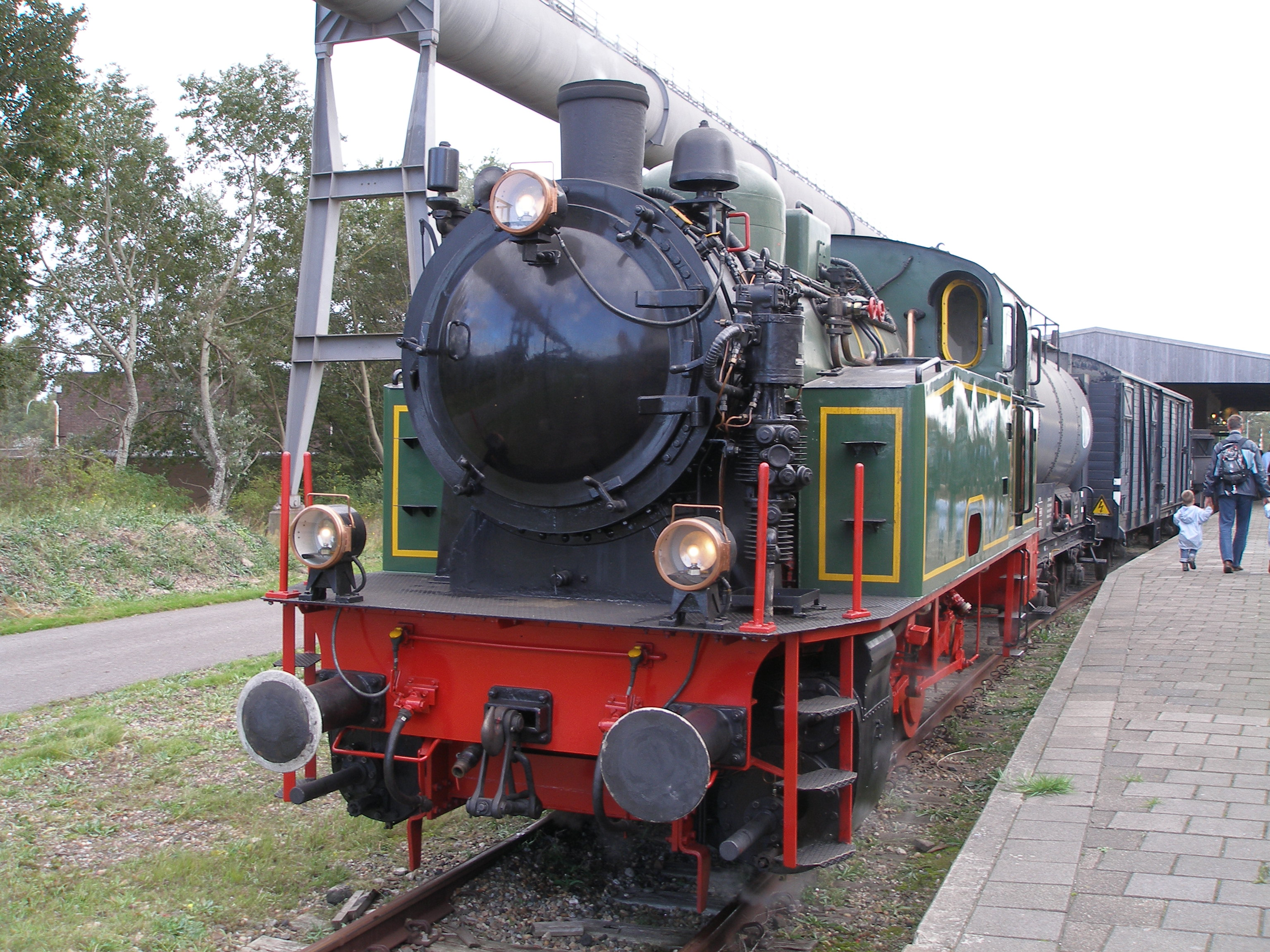 Stoomlocomotief 22 "Tom" van Hoogovens Stoom IJmuiden te station Velserbosch